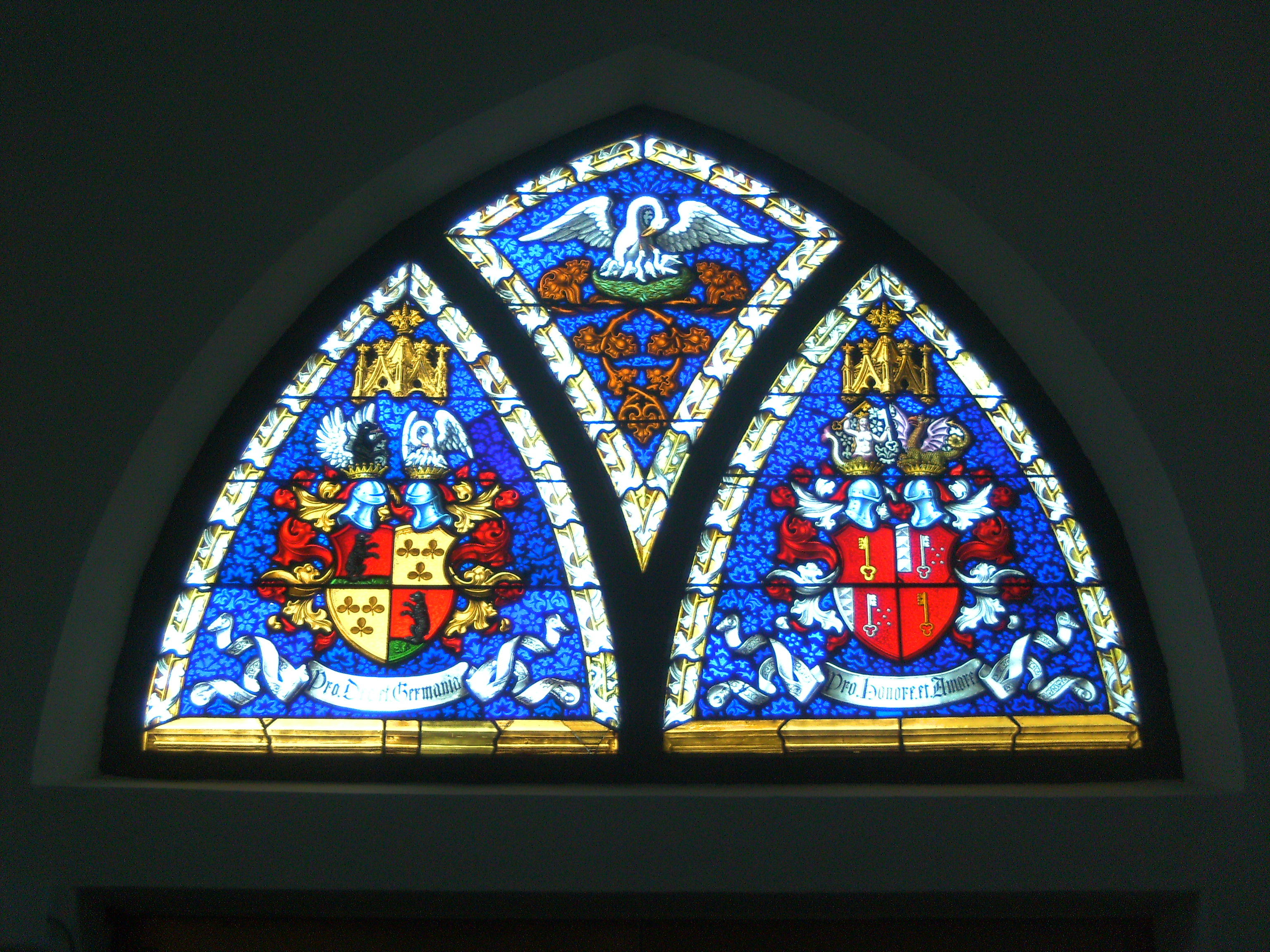 Ehewappen der Freiherren von Bernhard und Gräfin von Froberg genannt Montjoye, Glasfenster in der Grablege der Familie von Bernhard in der Erolzheimer Maria im Busch.